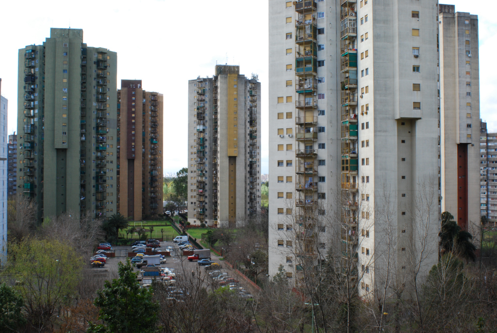 Varios edificios en el barrio General Savio (Lugano 1 y 2), Villa Lugano